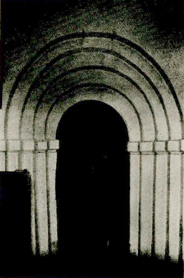 Західний портал церкви-ротонди святого Василія у Володимирі на Волині.